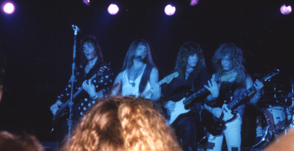 Europe - Prisoners in paradies World Tour, Hamburg - Große Freiheit 36, 1994 vlnr: John Leven, Mic Michaeli, Joey Tempest, Kee Marcello